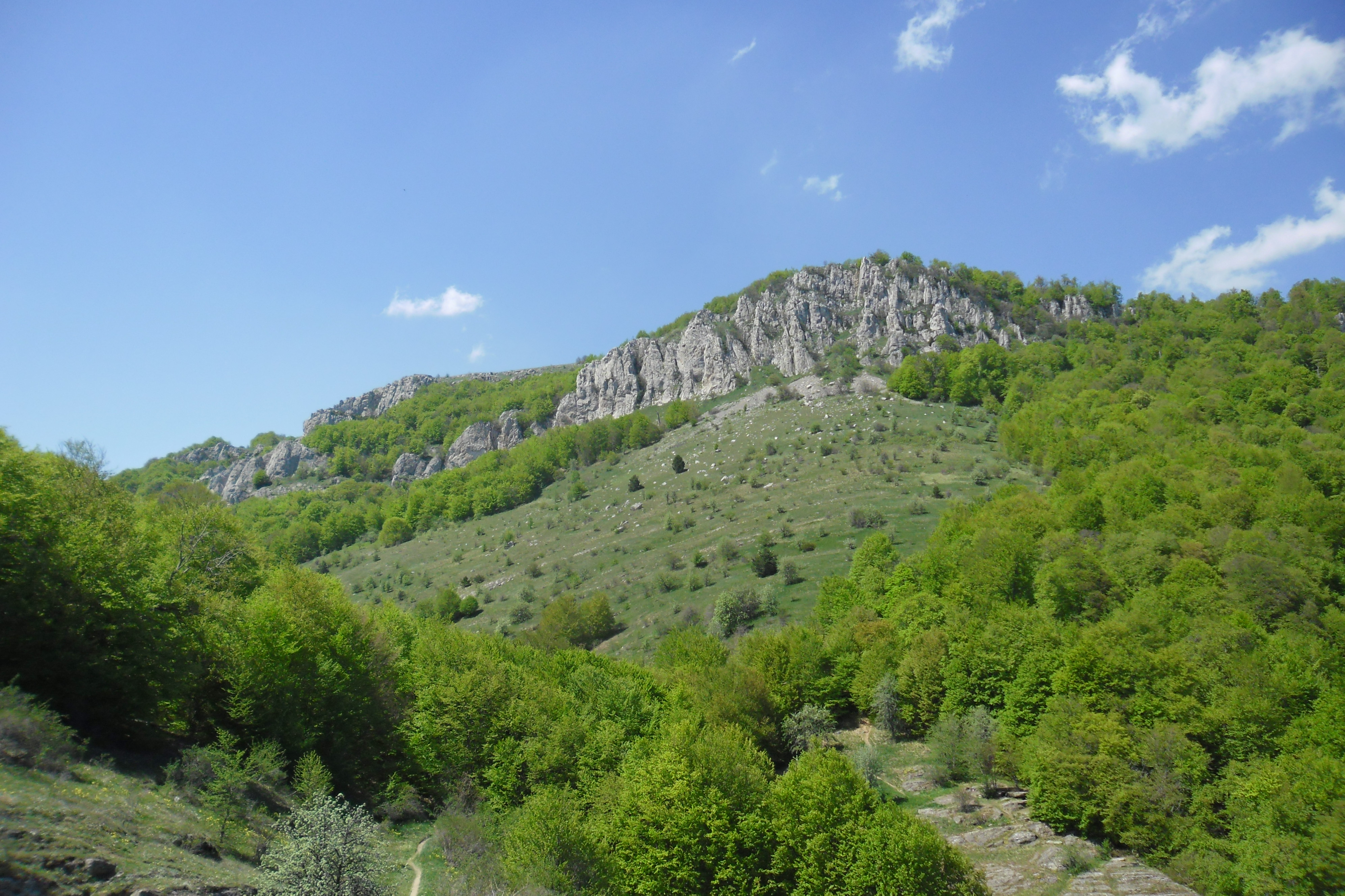 Юркині_скелі: Фото